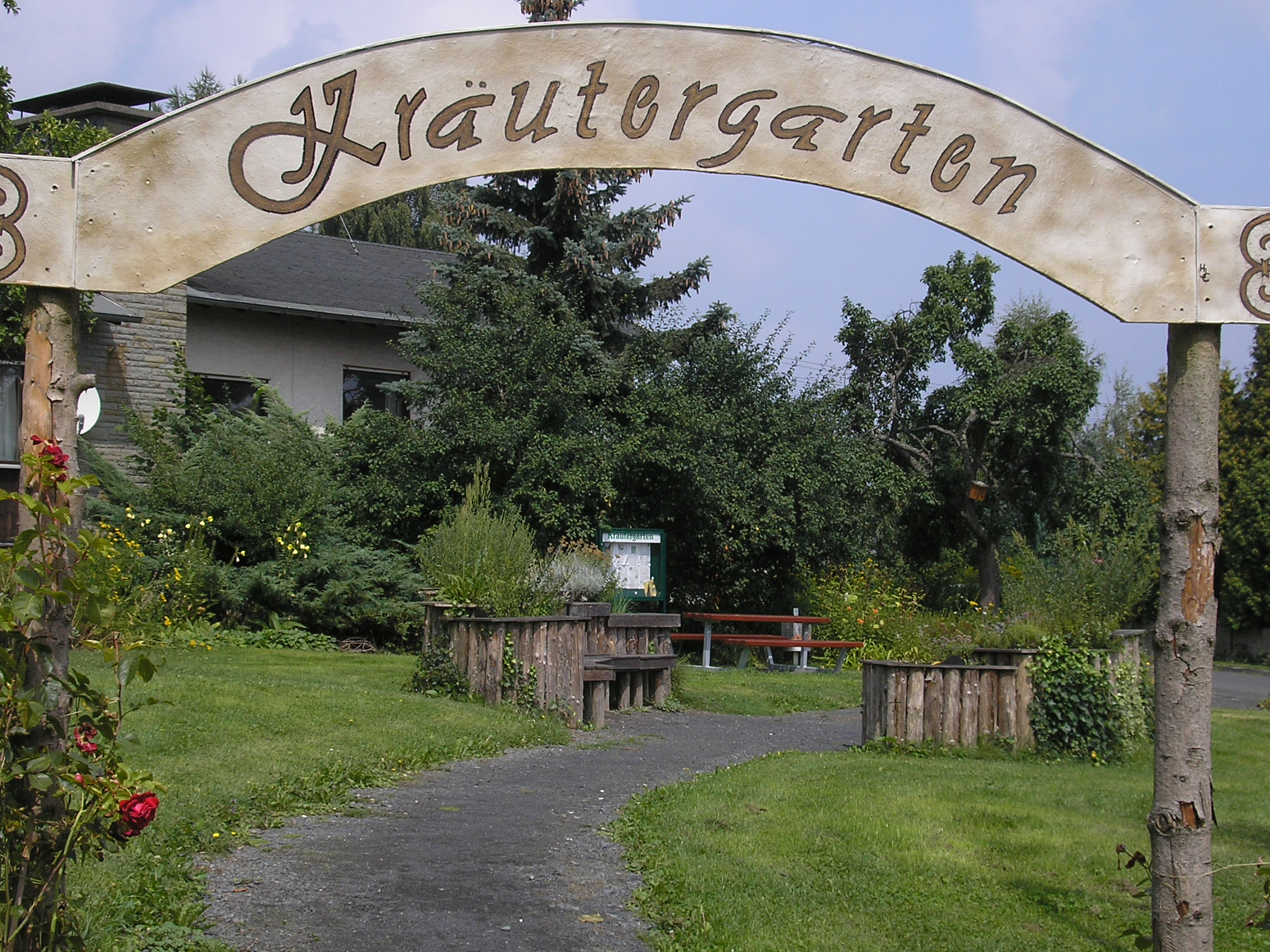 Kräutergarten Horhausen (Westerwald). "Westerwaldgeeignete" Kräuter im Rahmen der Kampagne "Unsere Gemeinde is(s)t gesund und fit" im Ortskern von Horhausen.